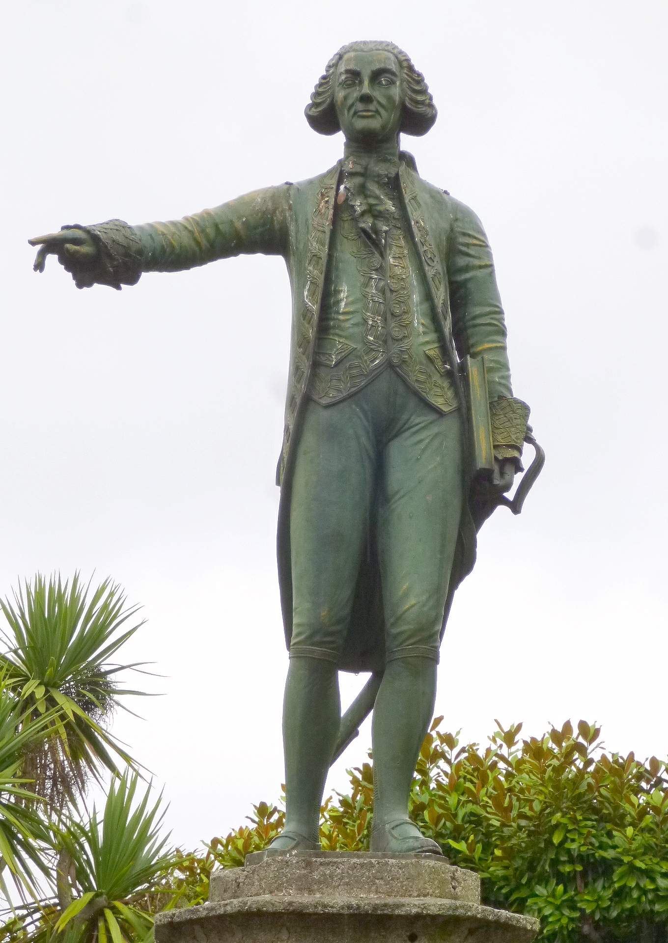 Ferrol - Jardines de Herrera, monumento a Jorge Juan